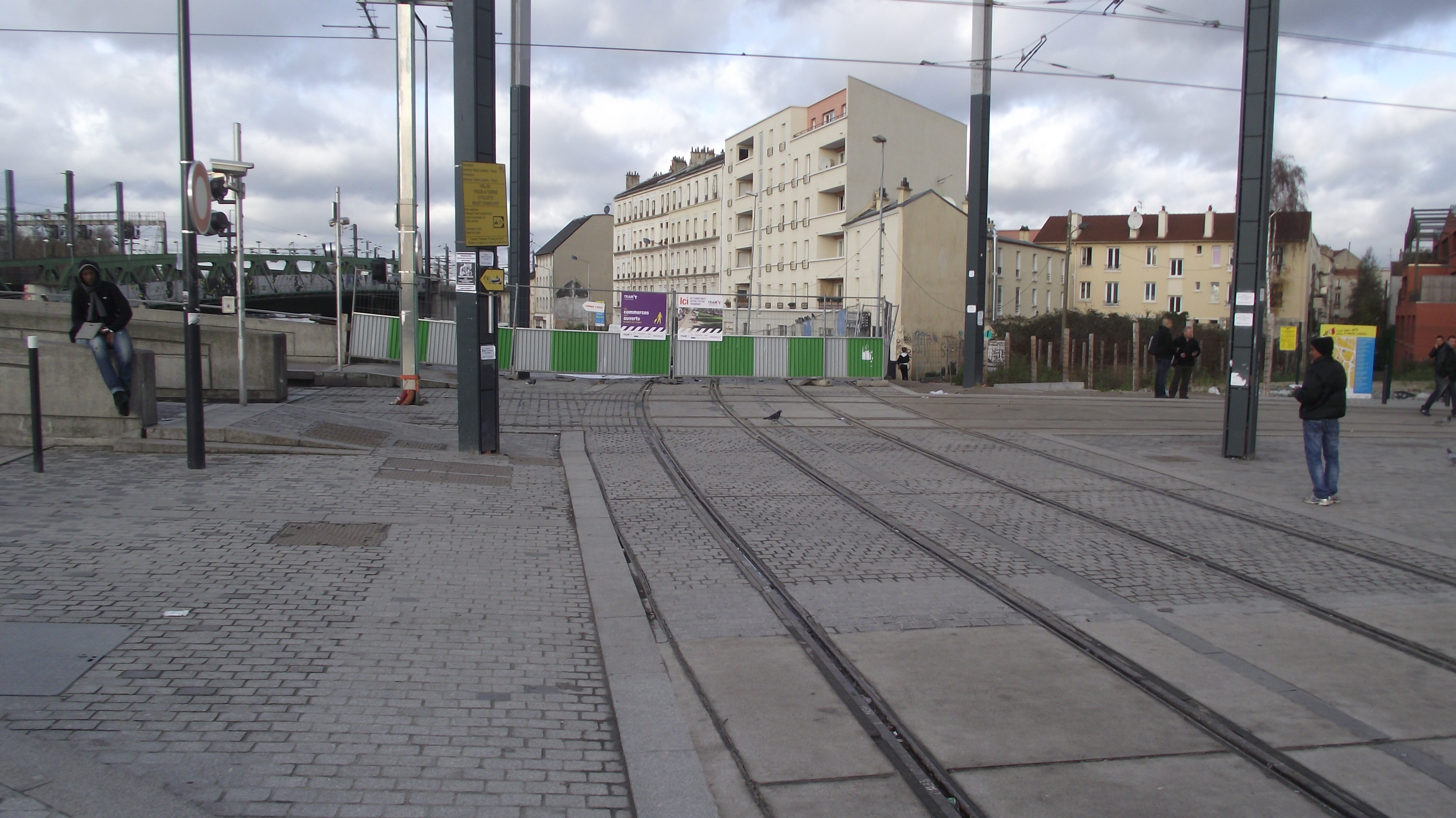 Voies du Tram T8 a Gare de Saint-Denis